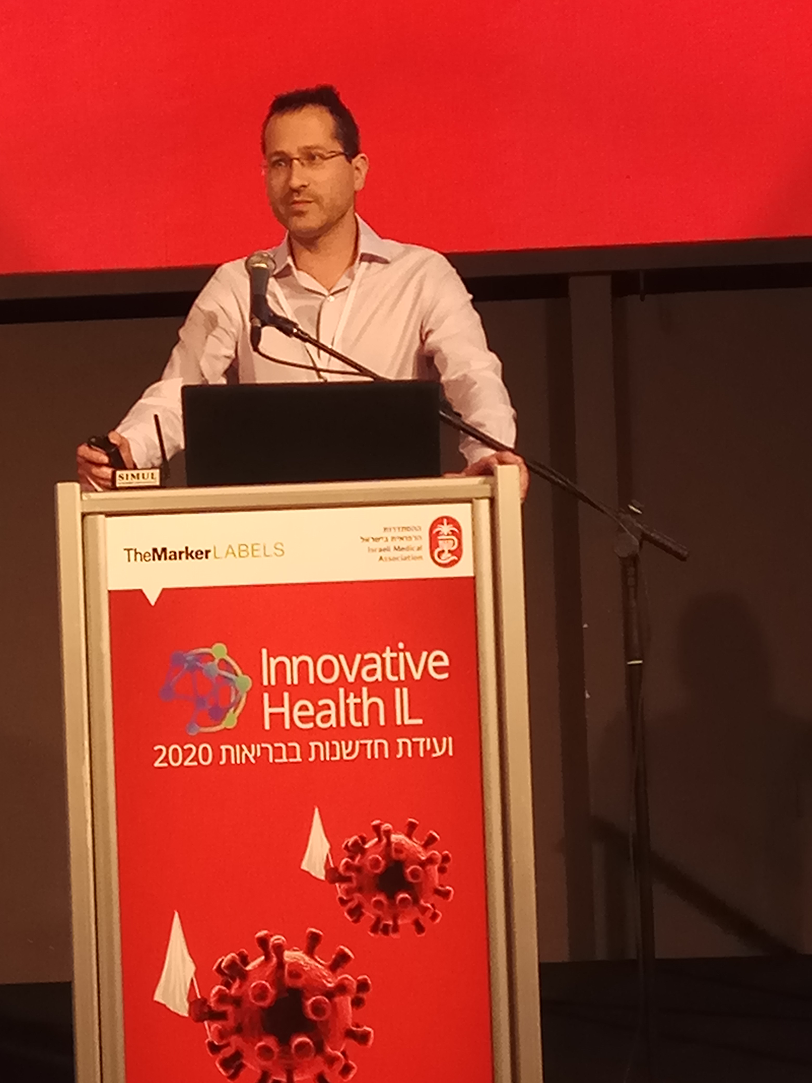 ד"ר גל מרקל בוועידת חדשנות בבריאות 2020